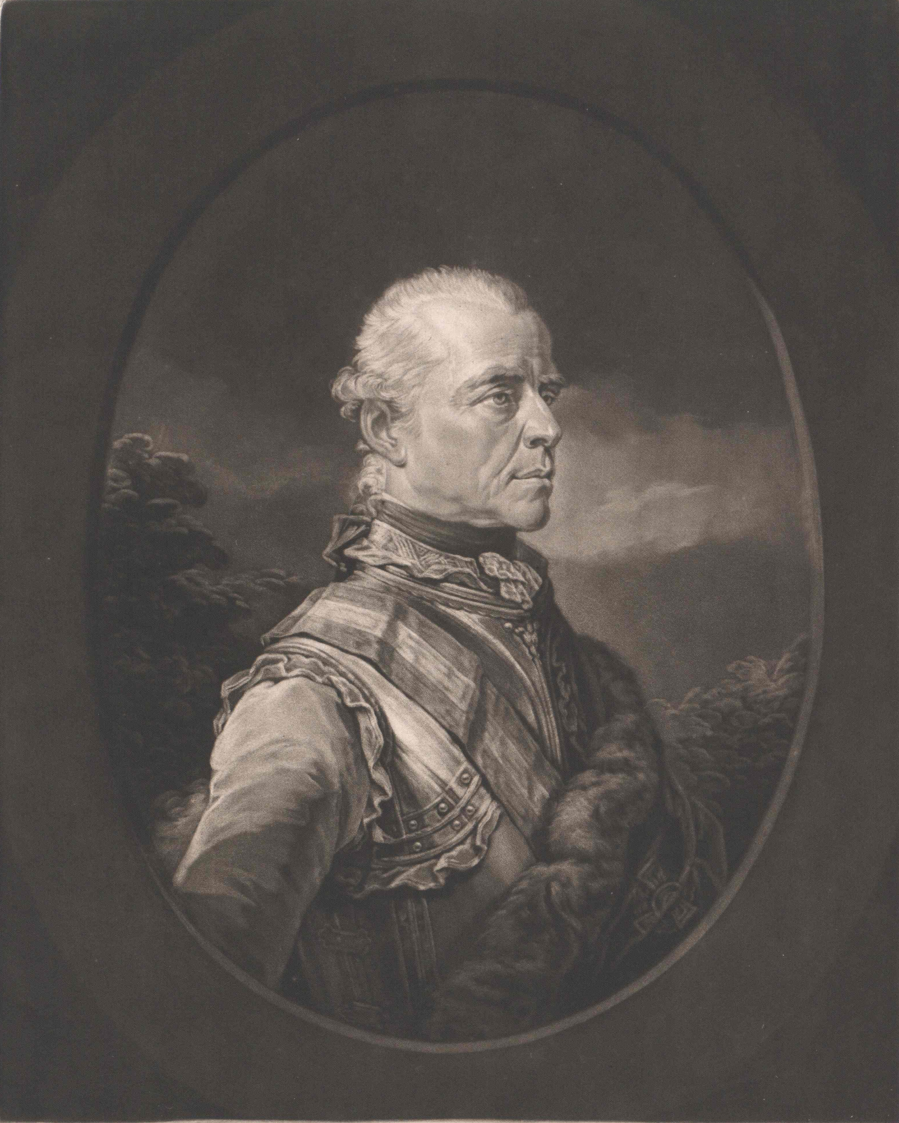 Friedrich Wilhelm Fürst zu Hohenlohe-Kirchberg (1732–1796), österreichischer Feldzeugmeister